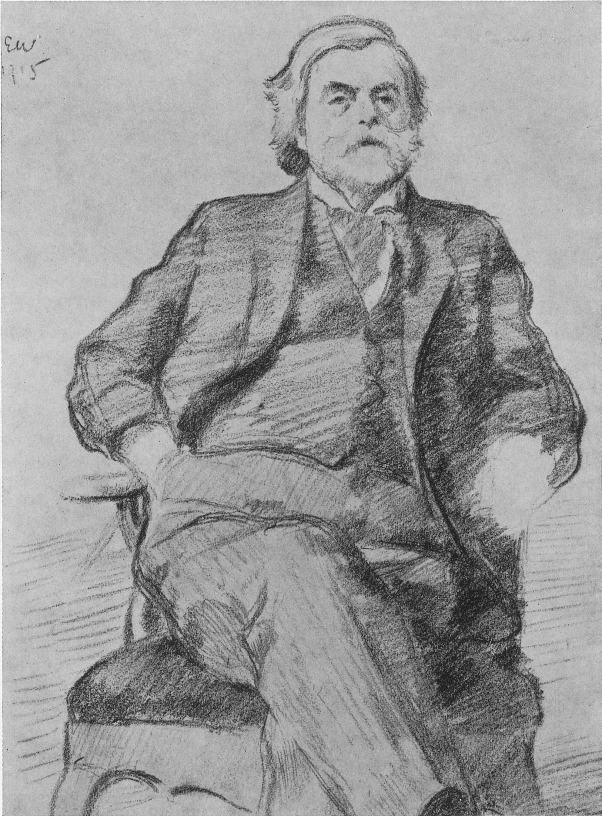 Språkforskeren Alf Torp tegnet av Erik Werenskiold